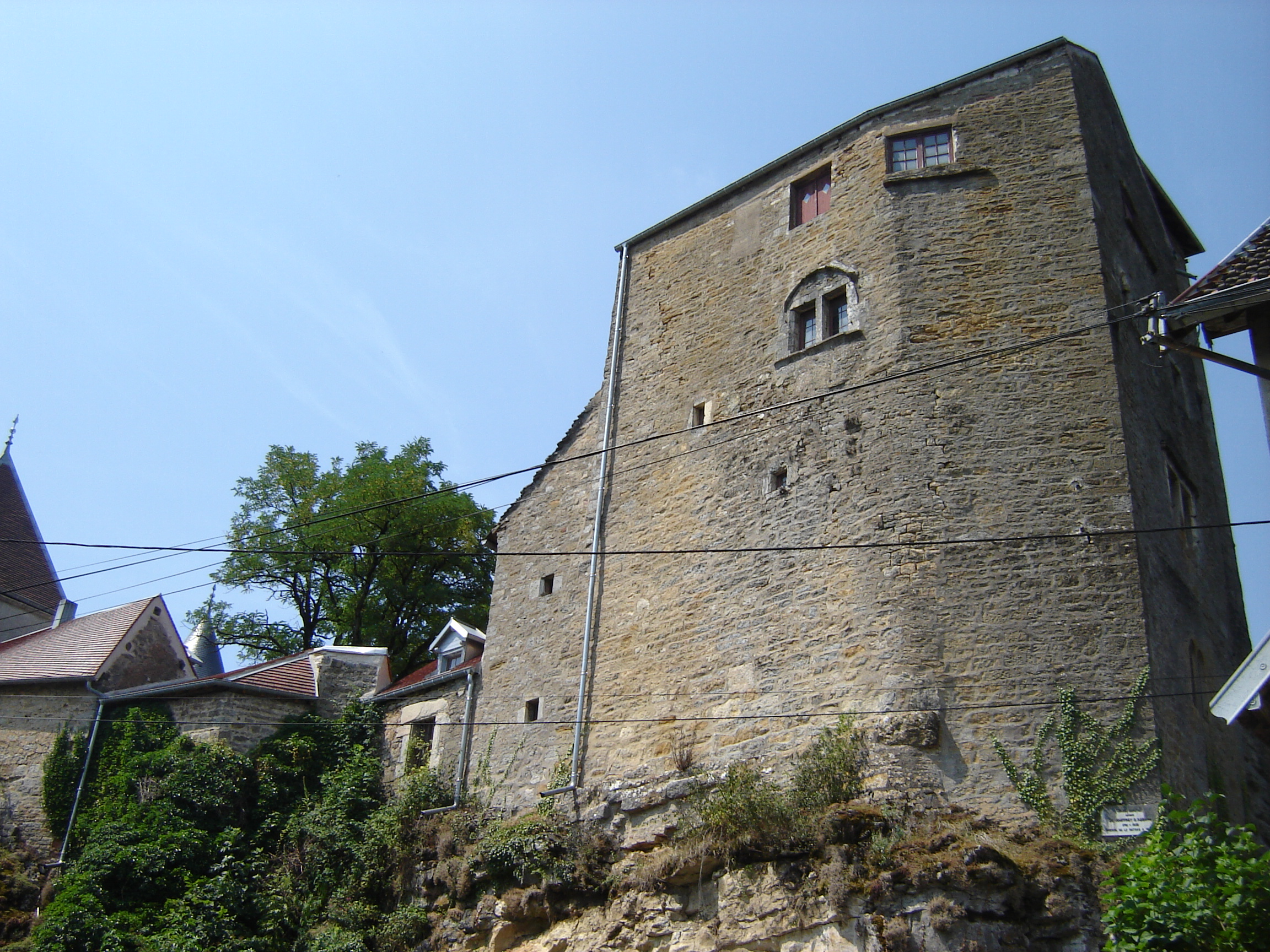 Schloss, Donjon (Bergfried) aus dem 12. Jhdt.